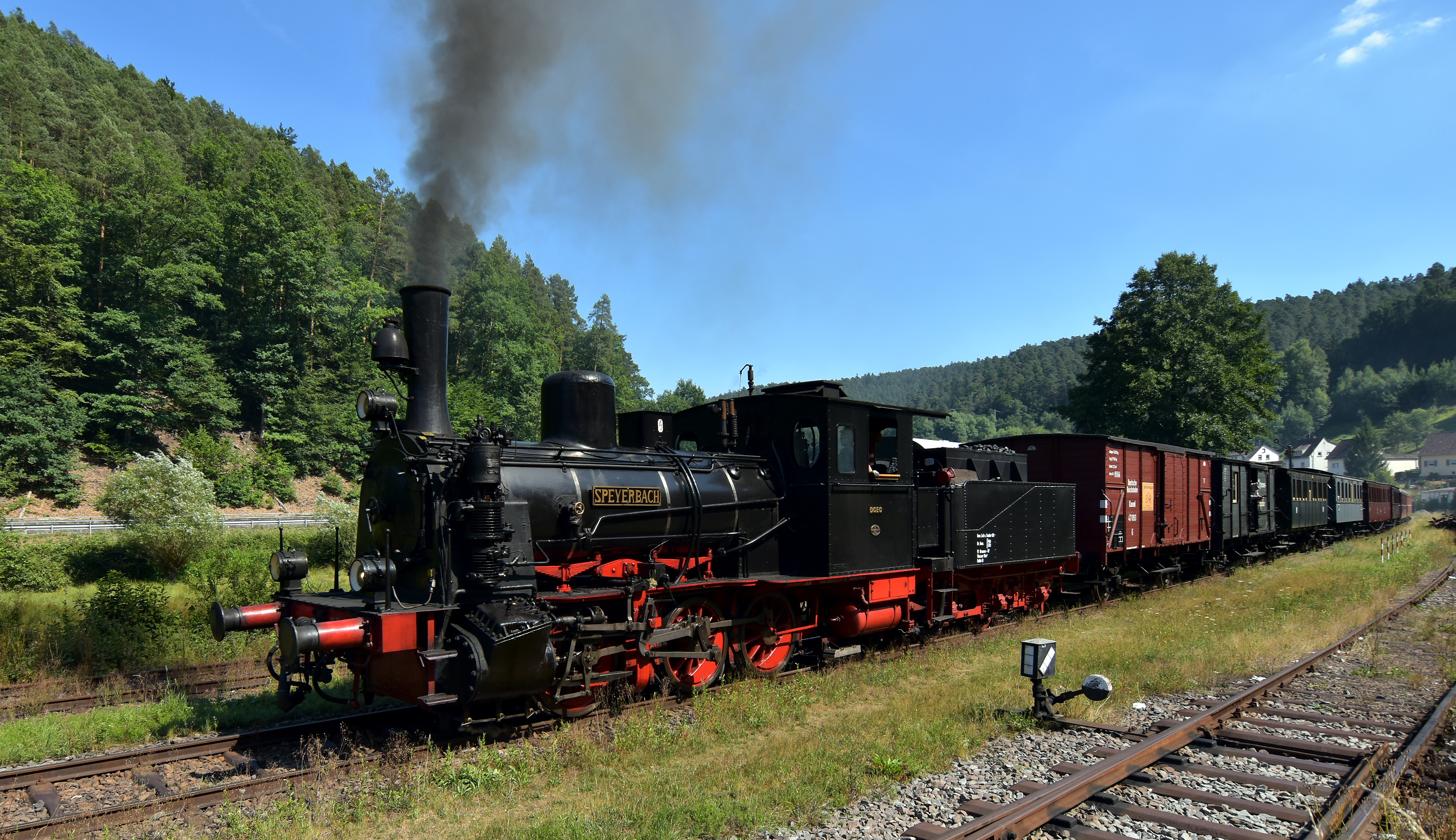 Dampflokomotive „Speyerbach“ auf dem Kuckucksbähnel in Elmstein; erbaut 1904 von der Maschinenbau-Anstalt Humboldt AG in Köln-Kalk, 420 PS, 40 km/h Höchstgeschwindigkeit